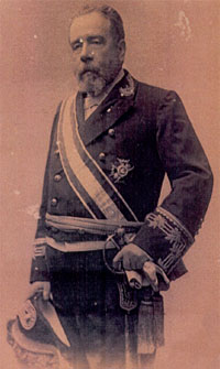 Rogelio Inchaurrandieta y Paez, fotografiado con la condecoración recibida como recompensa a su magnífica labor como Ingeniero, la Gran Cruz de Isabel la Católica.